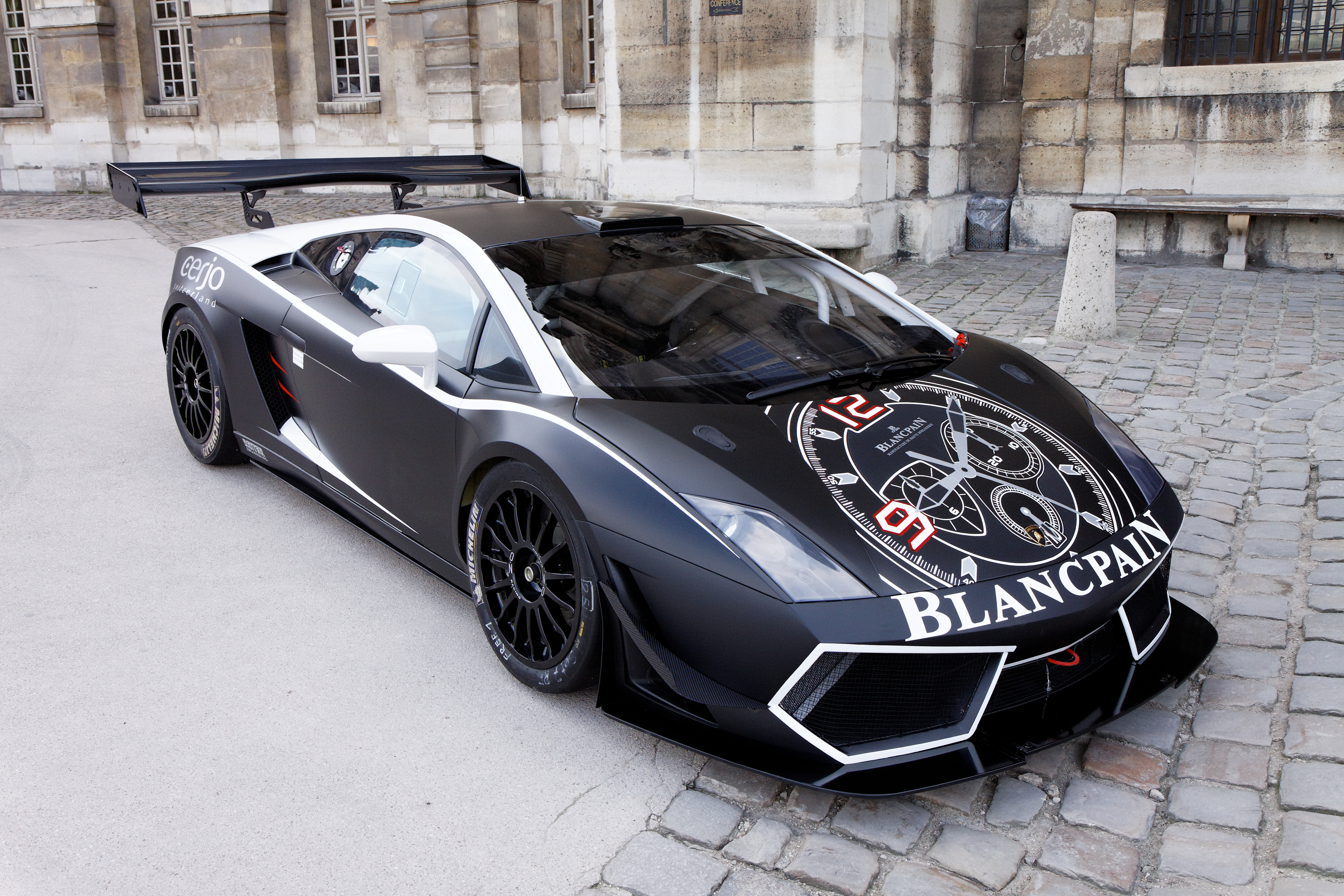 Photographie prise lors de la présentation du Blancpain Endurance series aux Invalides à Paris en mars 2011.